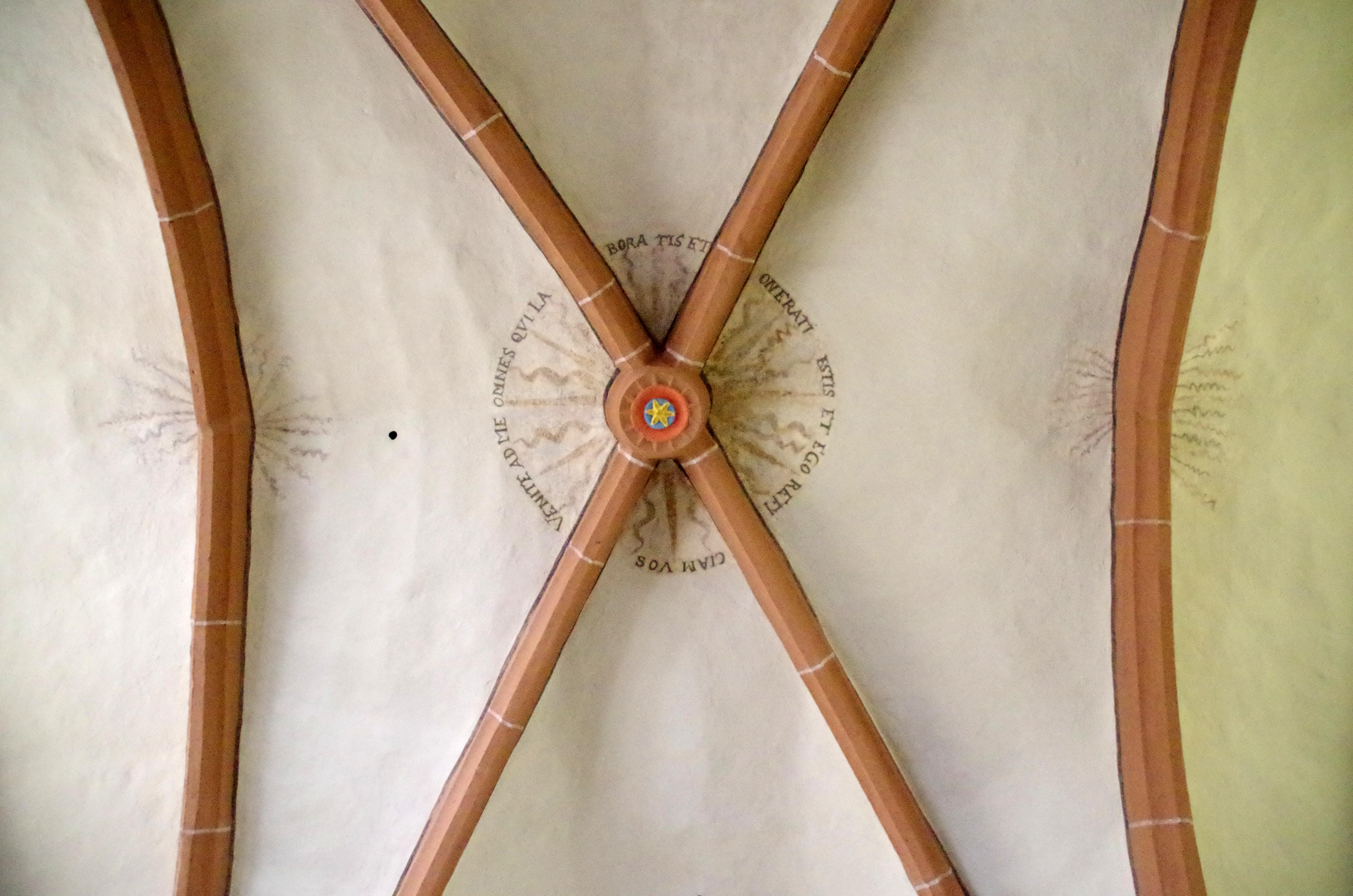 St. Peter (Zingsheim), Kreuzrippengewölbe mit Schlussstein